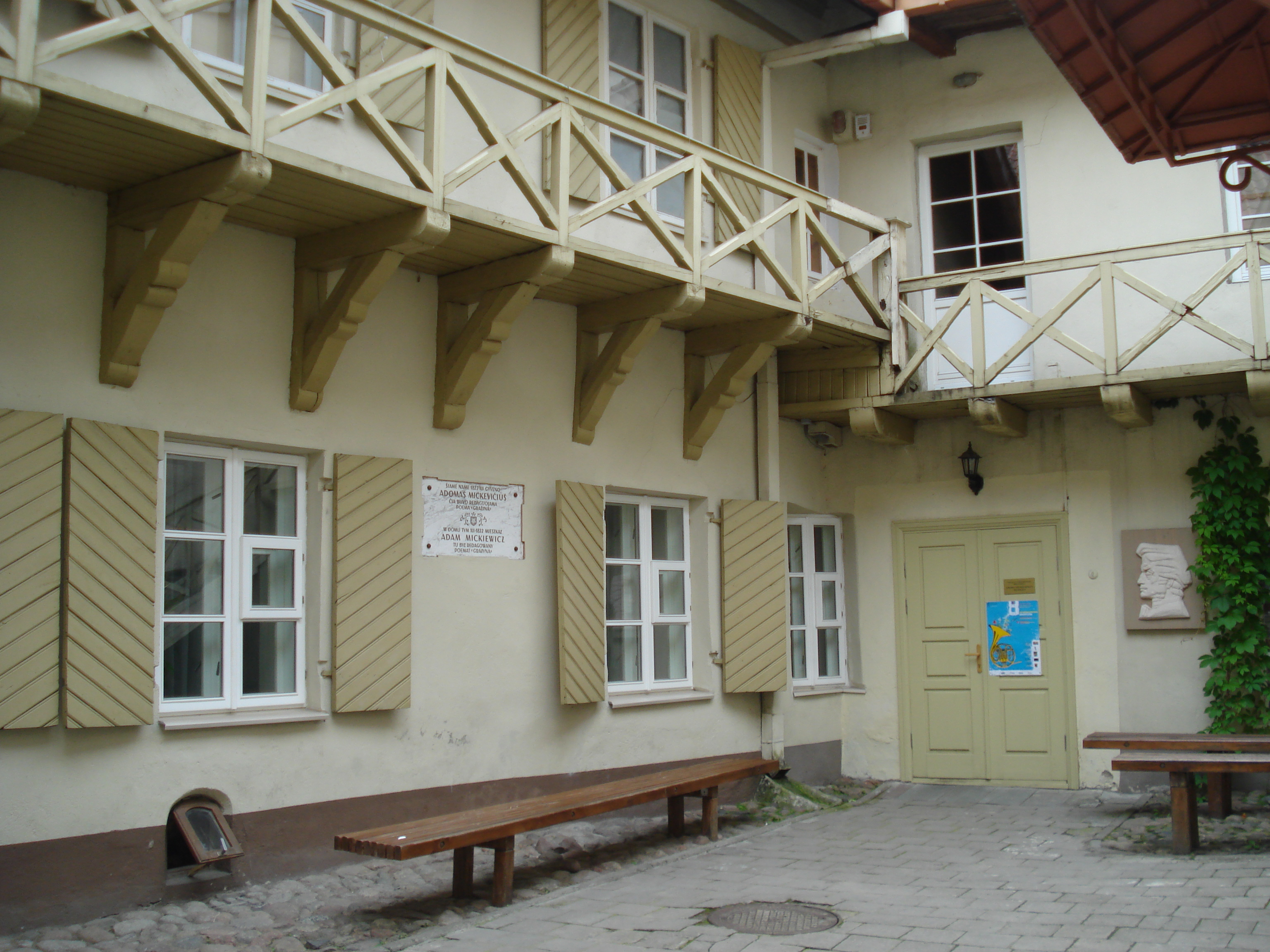 Adam Mickiewicz Museum in Vilnius. Bernardinu g. 11